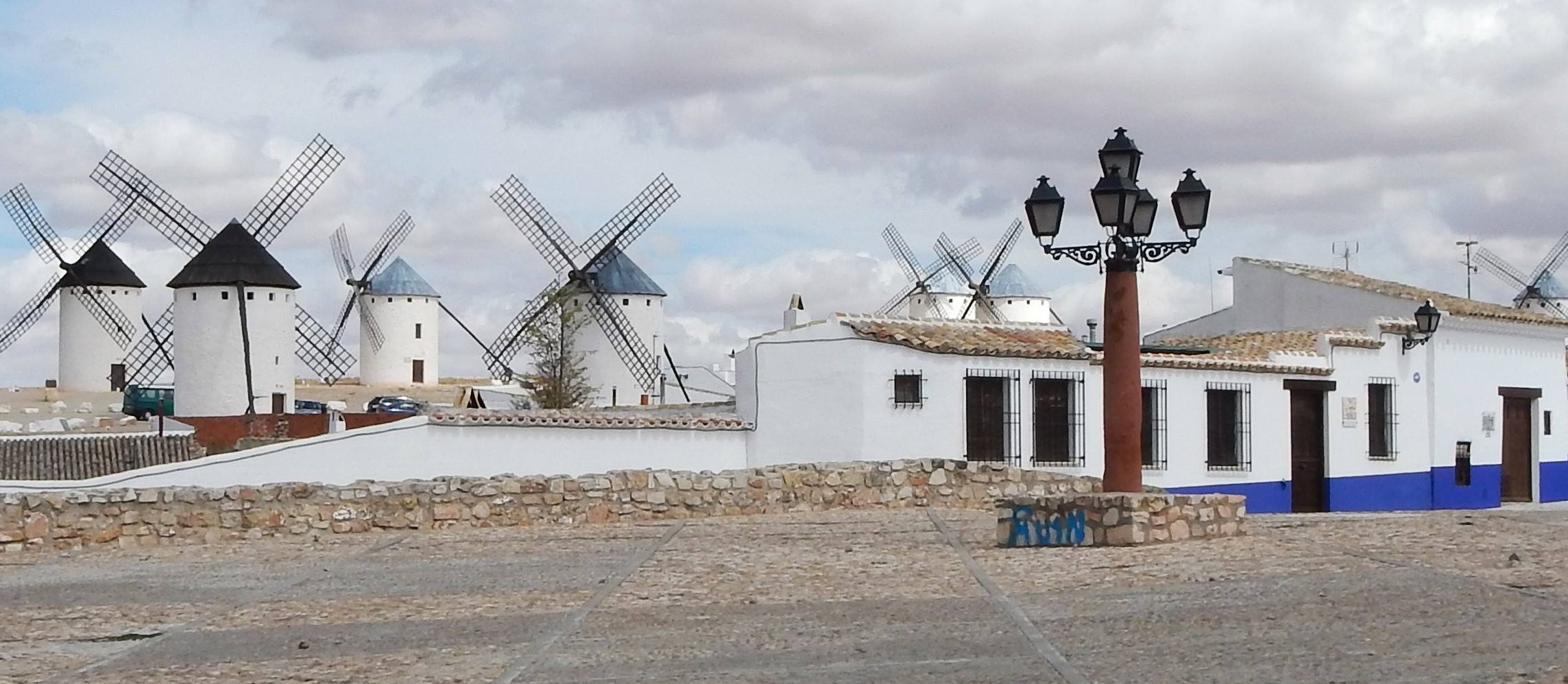 Conjunto de molinos de viento desde el Cerro de la Paz